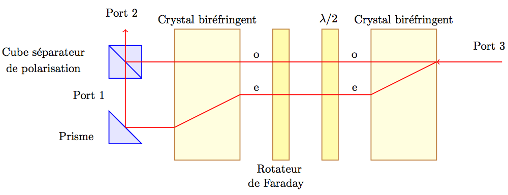 Schéma de principe d'un circulateur optique.